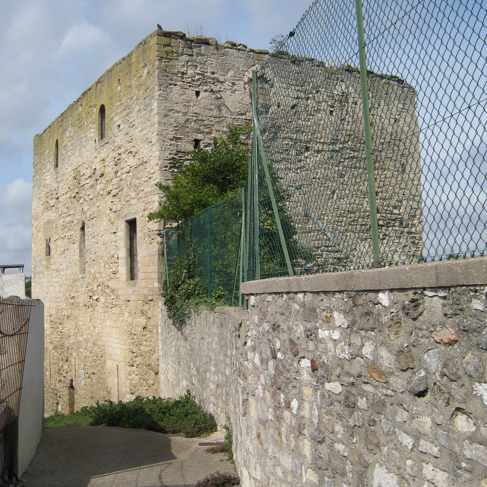 Tour Montjoie à Conflans Sainte-Honorine, Yvelines, France